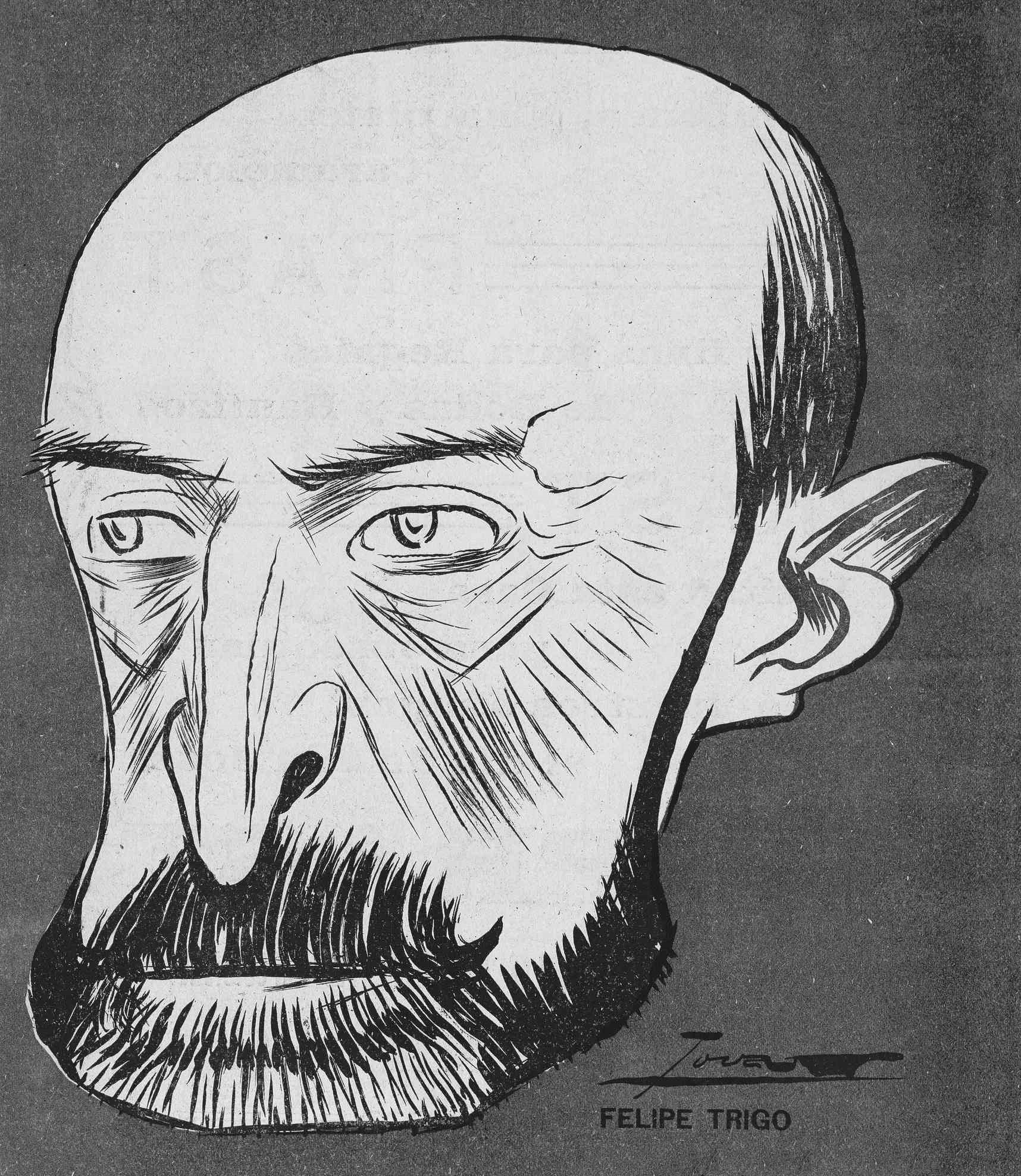 Eduardo de Palacio.Es un ilustre inmoralde sintáxis informal y sutiles liviandades,pero gana un dineralcon sus inmoralidades